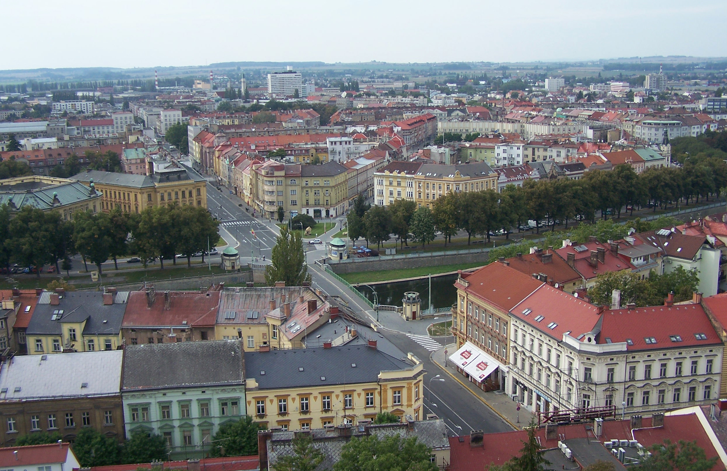 Česky: Hradec Králové - pohled z centra směrem k hlavnímu nádraží - OpenStreetMap(Info)